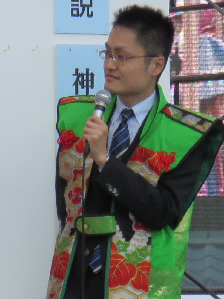 将棋棋士の稲葉陽（平成27年11月28日、姫路市で行われた人間将棋にて）